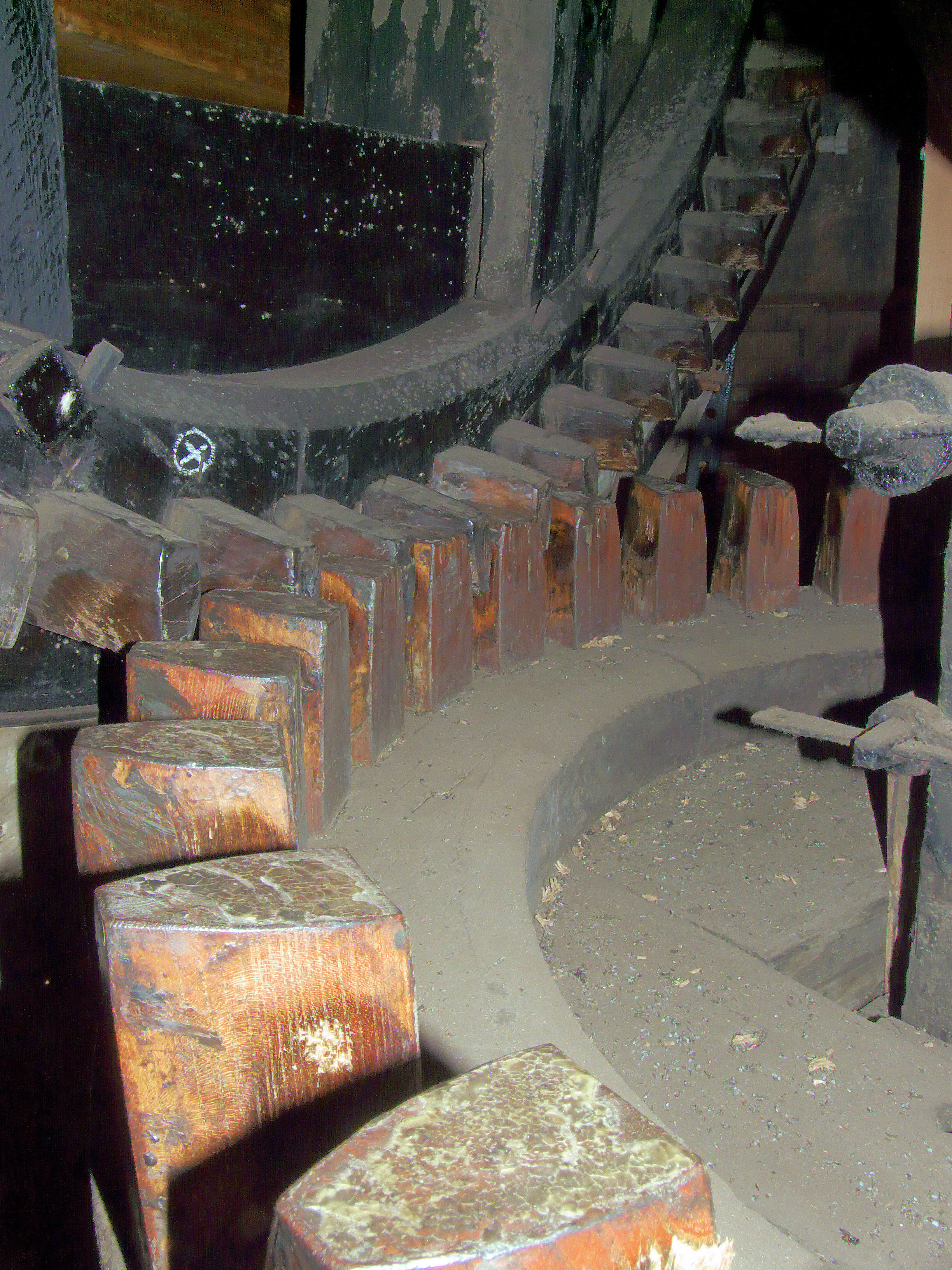 Molen De Kroon Arnhem bovenwiel met bonkelaar